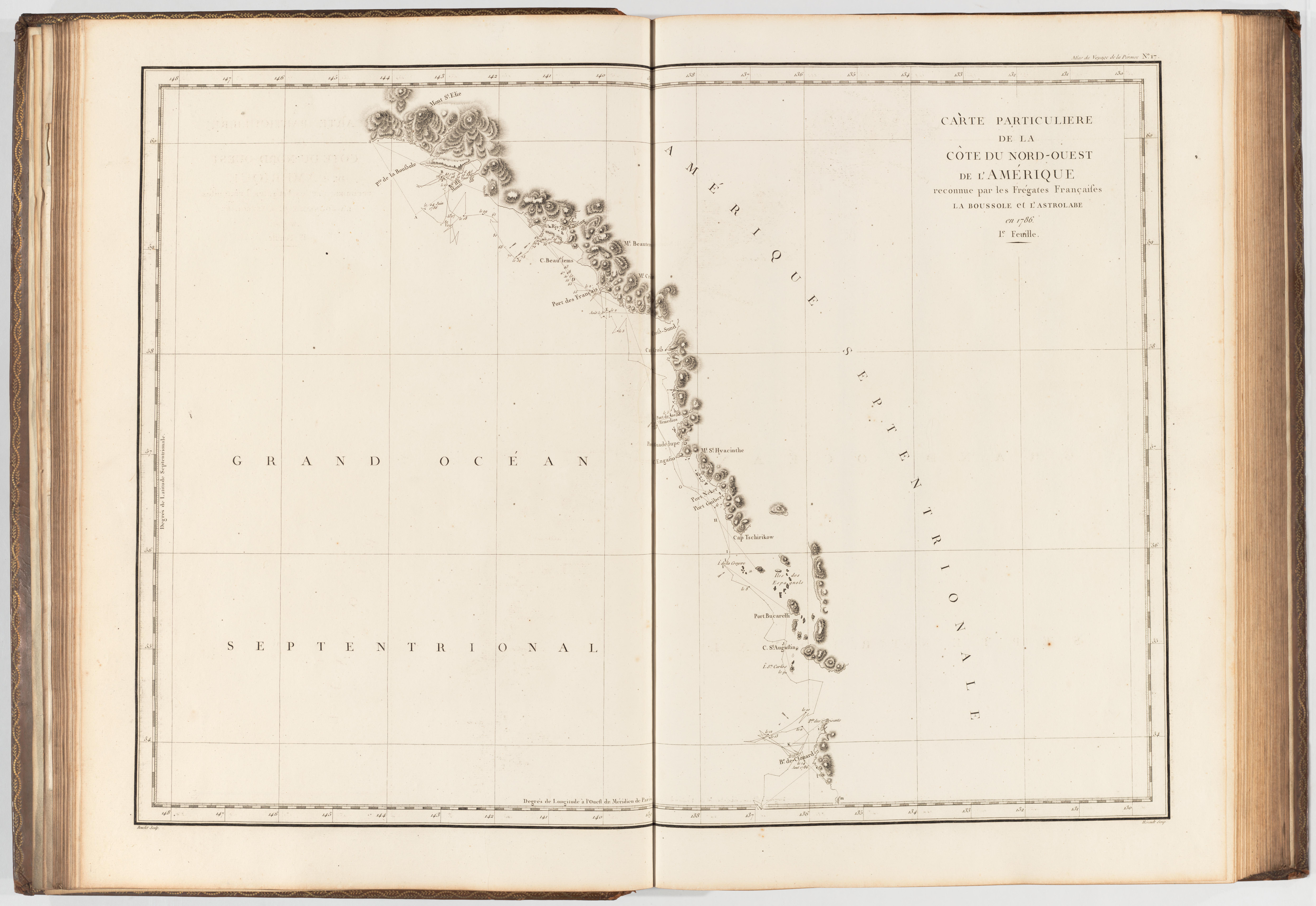 Voyage de La Pérouse autour du monde /publié conformément au décret du 22 avril 1791, et rédigé par L.A. Milet-Mureau.